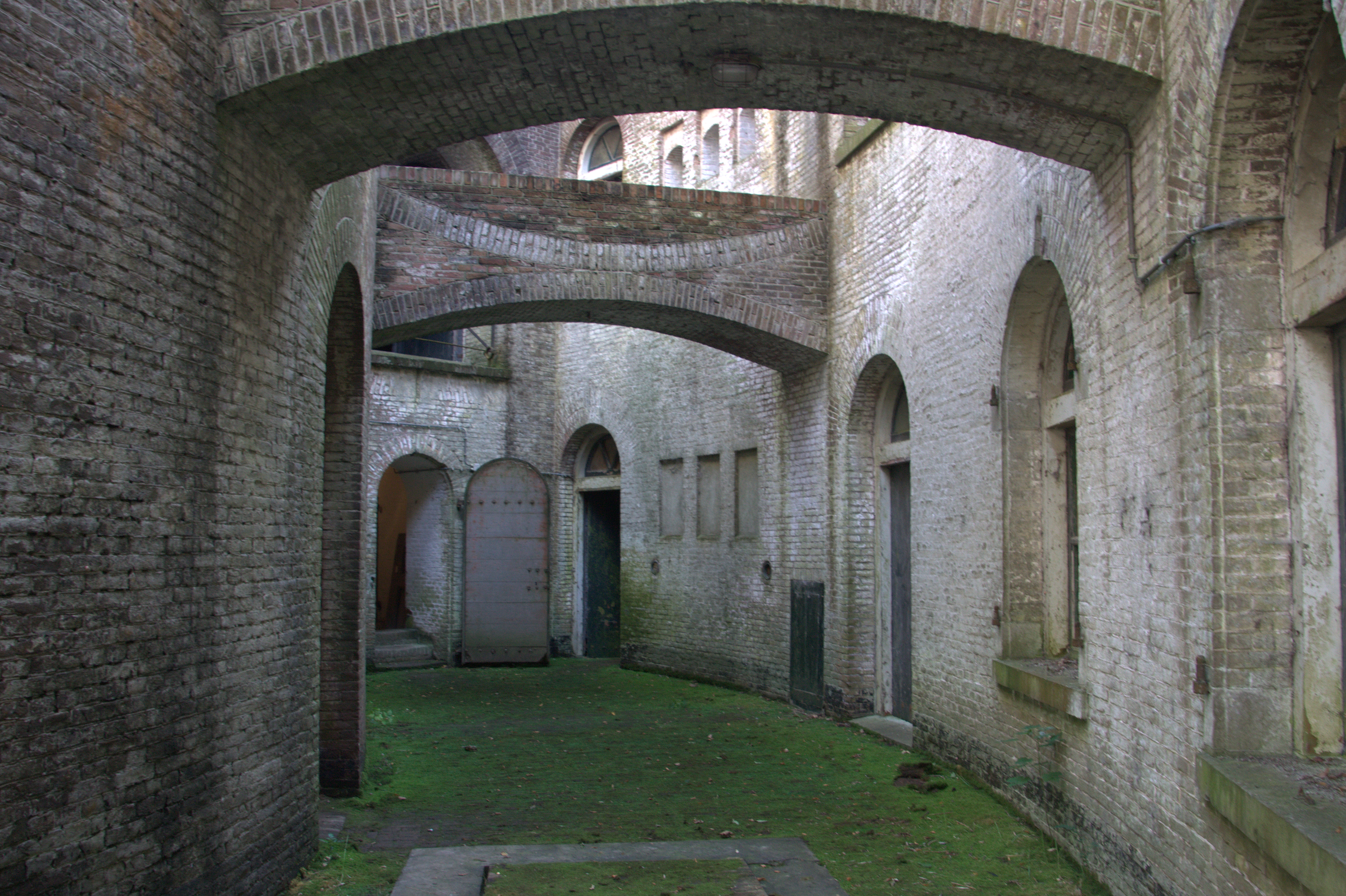 De vloer lijkt kunstgras maar bestaat geheel uit allerlei soorten mos, dat het goed doet in deze vochtige omgeving.